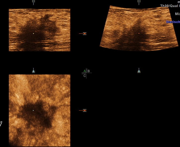 Mammakarzinom im 3-D Modus mit A, B und C Ebene und Rendermodus